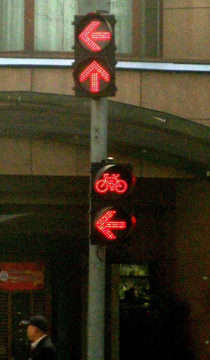 En Chine : changement intégral de couleur pour chacune des directions. Feu à l'état rouge pour les automobilistes et les cyclistes.